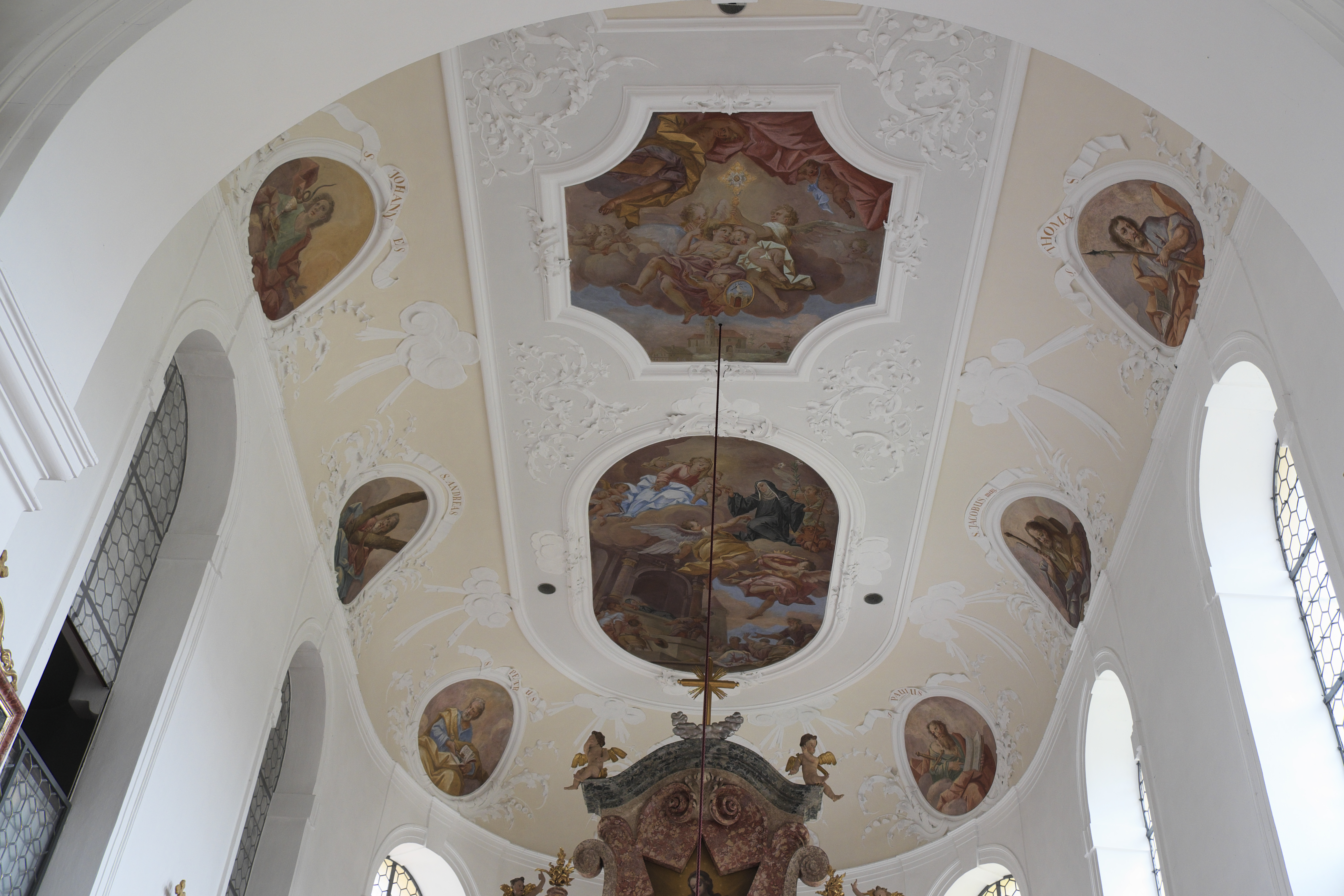 Katholische Pfarrkirche St. Walburga in Weißensee (Füssen) im Landkreis Ostallgäu (Bayern/Deutschland), Deckenfresko im Chor von Johann Heel, von 1730